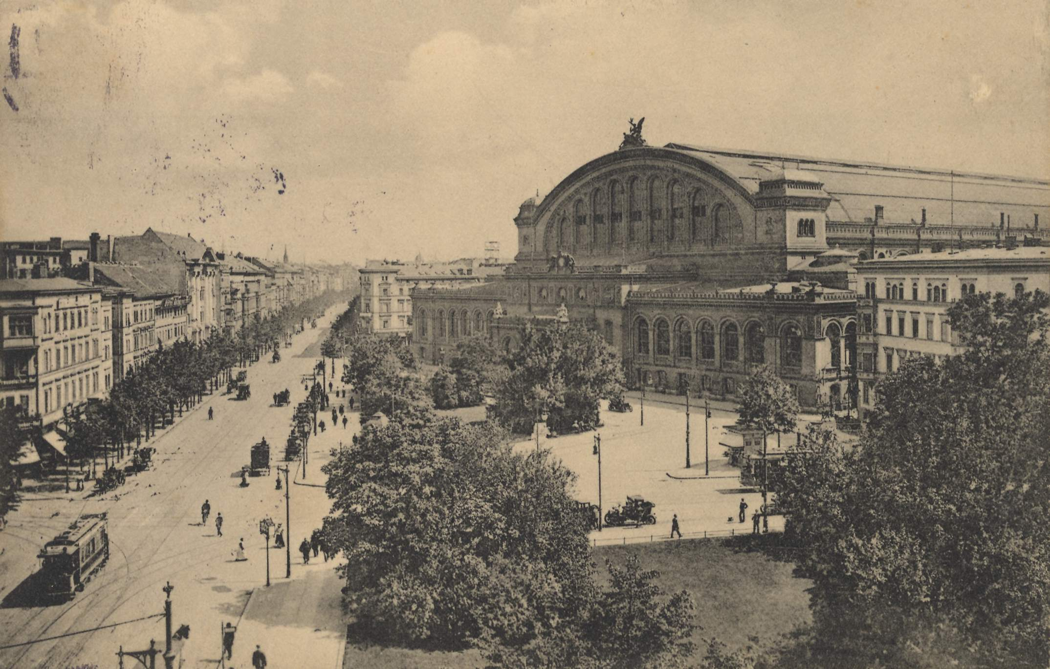 Anhalter Bahnhof in Berlin-Kreuzberg